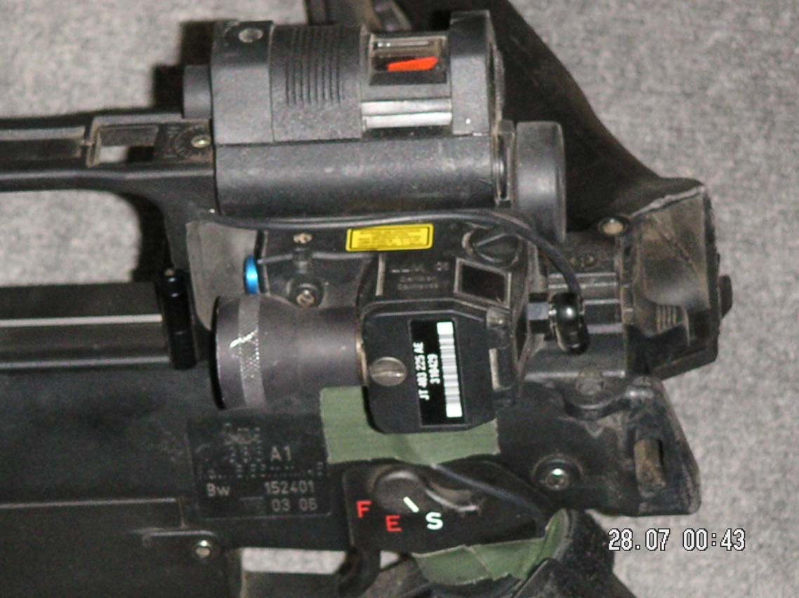 Seitenansicht LLM01 selbst fotografiert Khyperpass 28072005